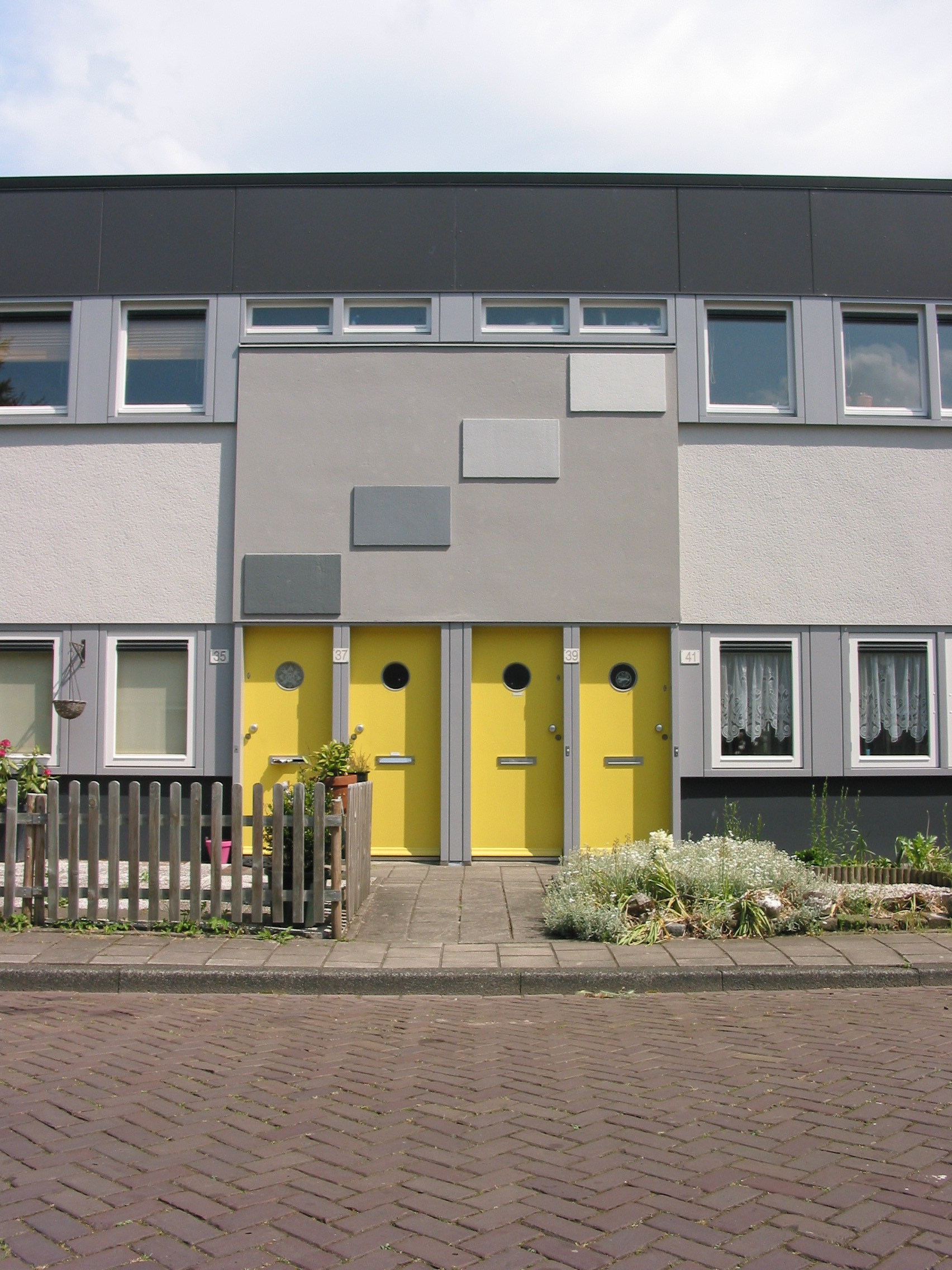 Han van Loghem (architect). Woonhuizen, Schovenstraat, Betondorp, Amsterdam. 1924 (gerenoveerd 1987).